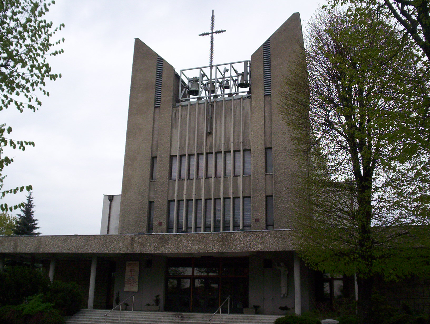 Kościól rzymskokatolicki w Zadolu - Katowice. Autor Michał Wierzbowski